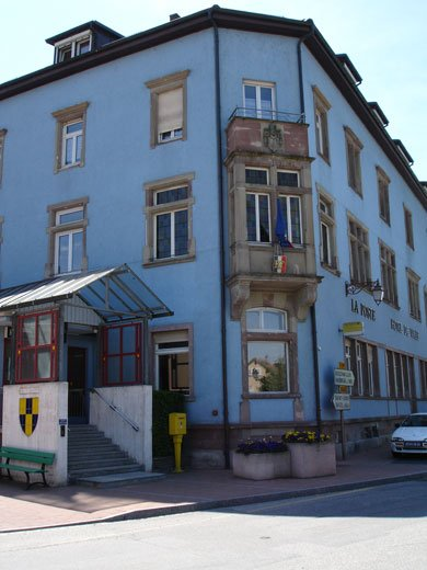 Mairie d'Hégenheim